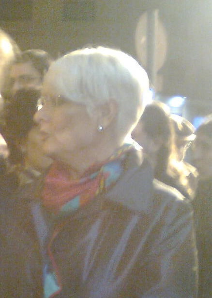 Mar Targarona als III Premis Gaudí